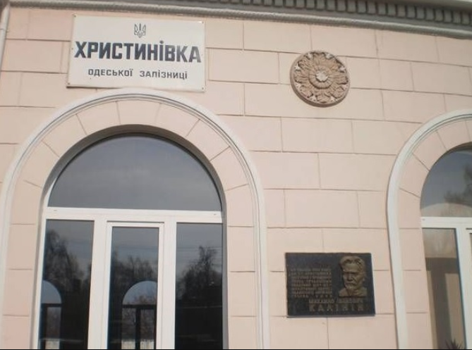 Здание вокзала станции Христиновка с демонтированной табличкой Калинину.